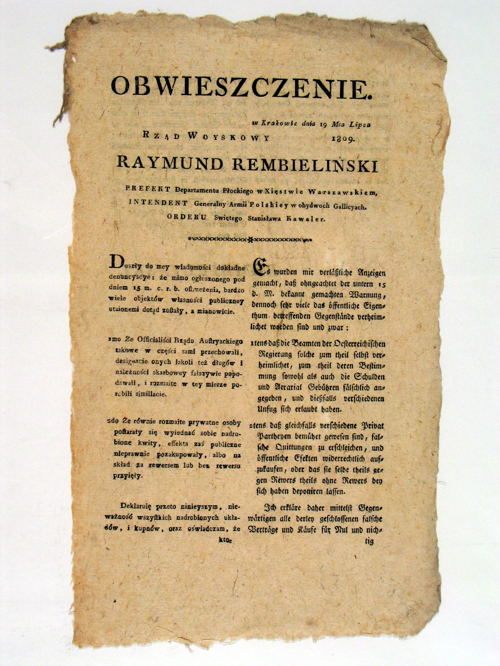 Obwieszczenie